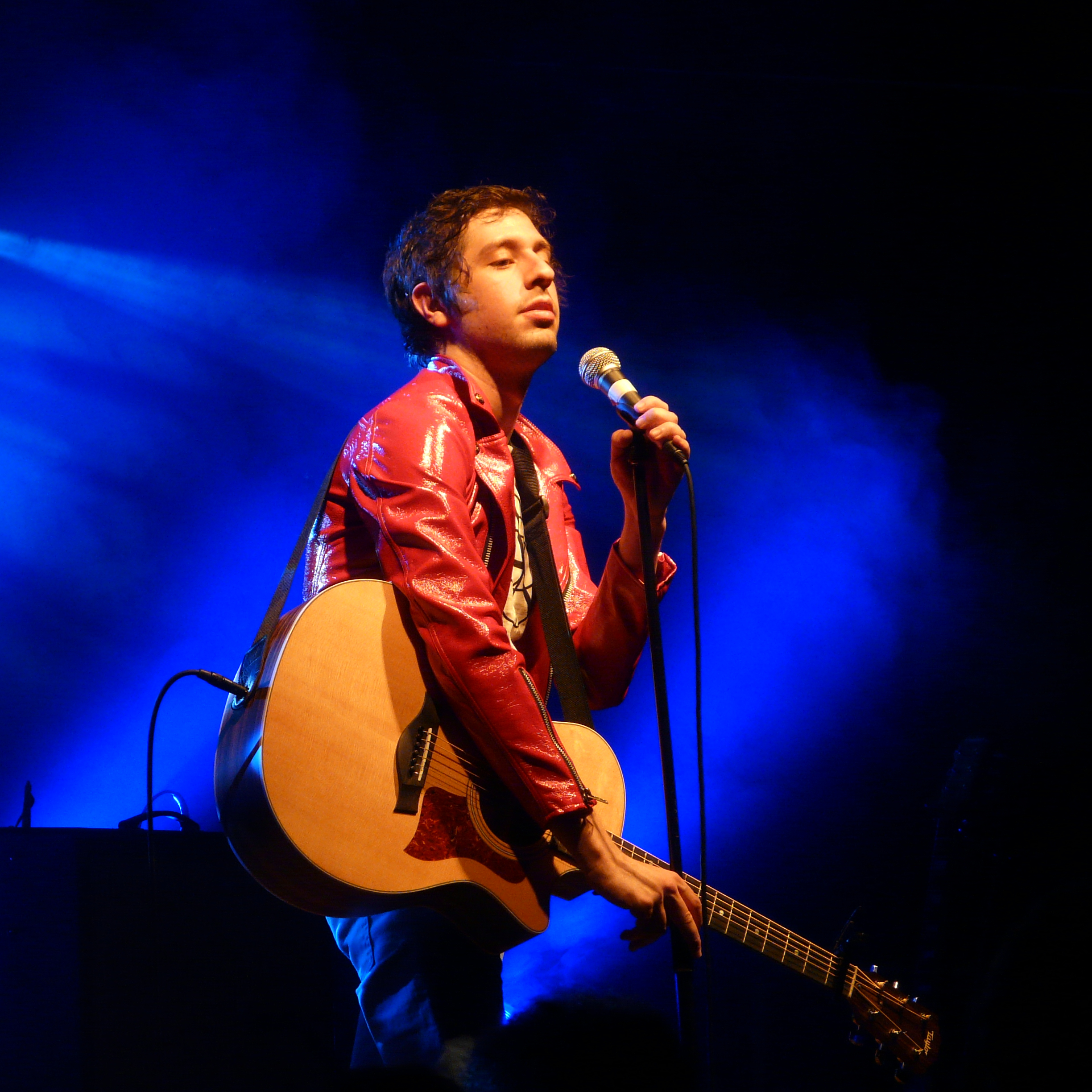 Adam Green au club106 le 8 novembre 2008